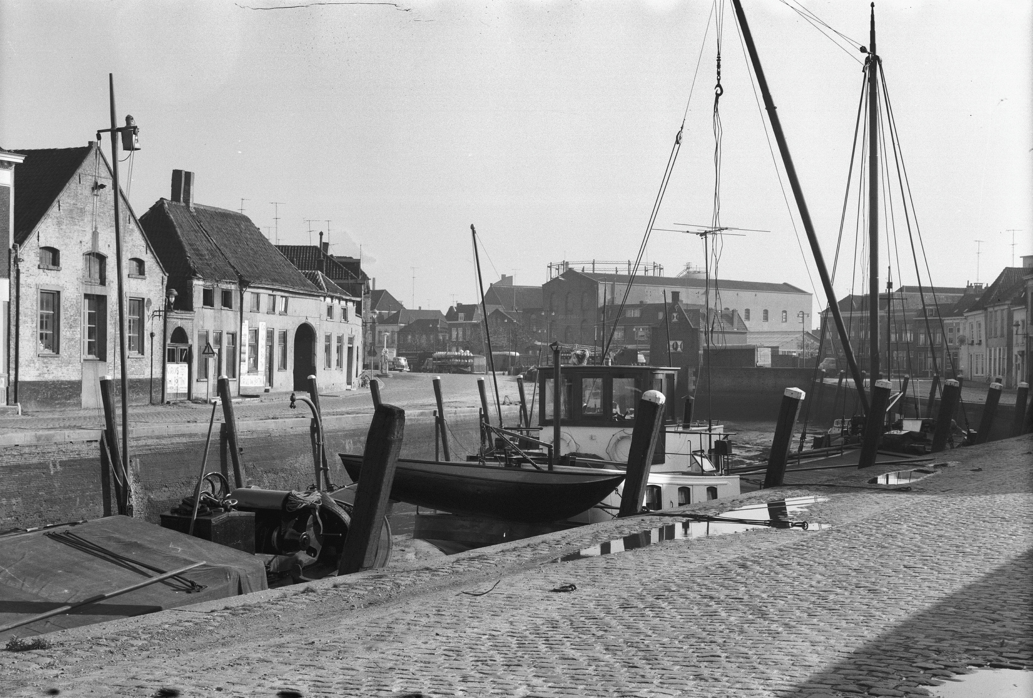 overzicht